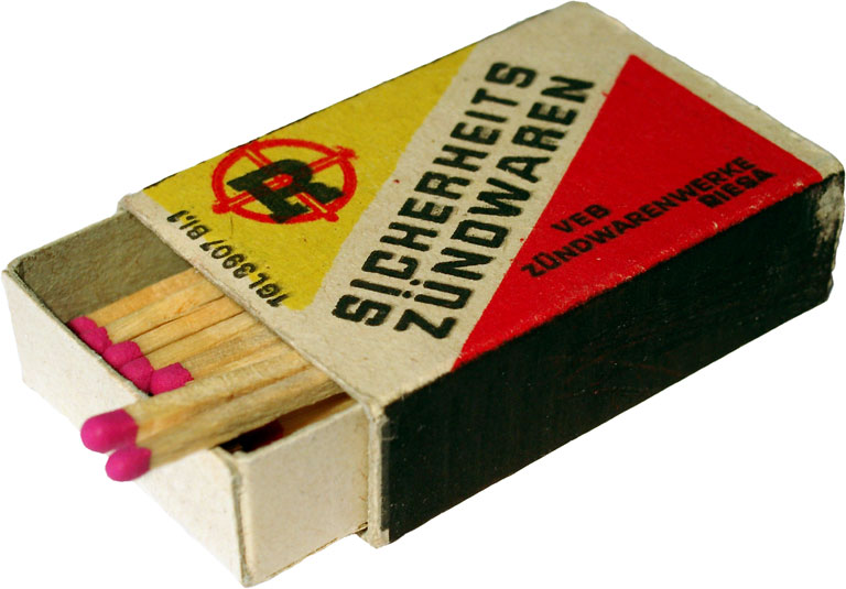 Zündhölzer aus der ehemaligen DDR. GNU-FDL, selbst fotografiert.